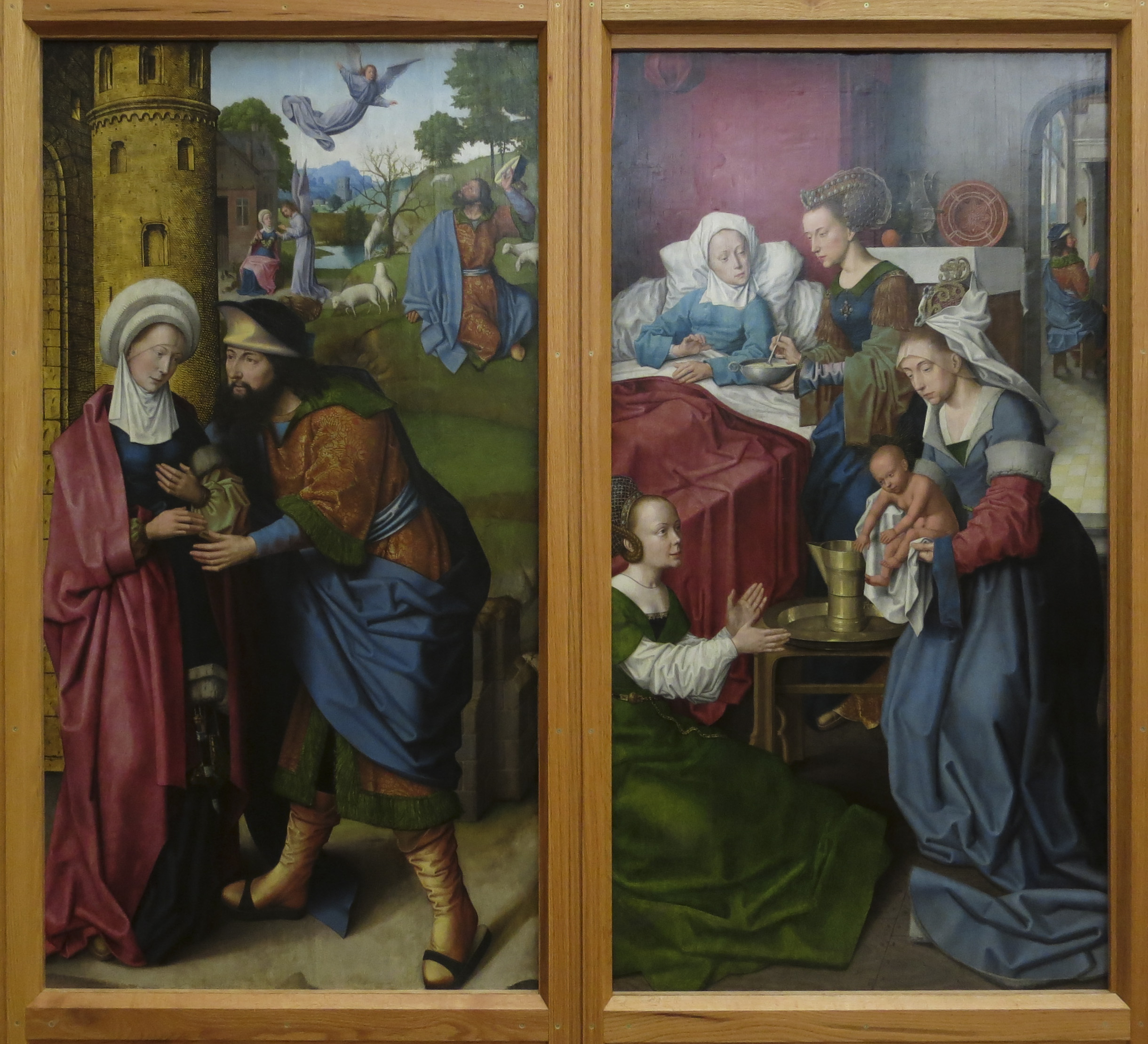 Políptico, Museu de Évora